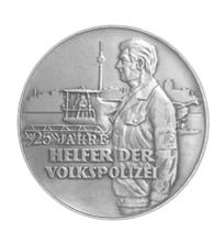 Ehrenmedaille 25 Jahre freiwillige Helfer der Volkspolizei (DDR)